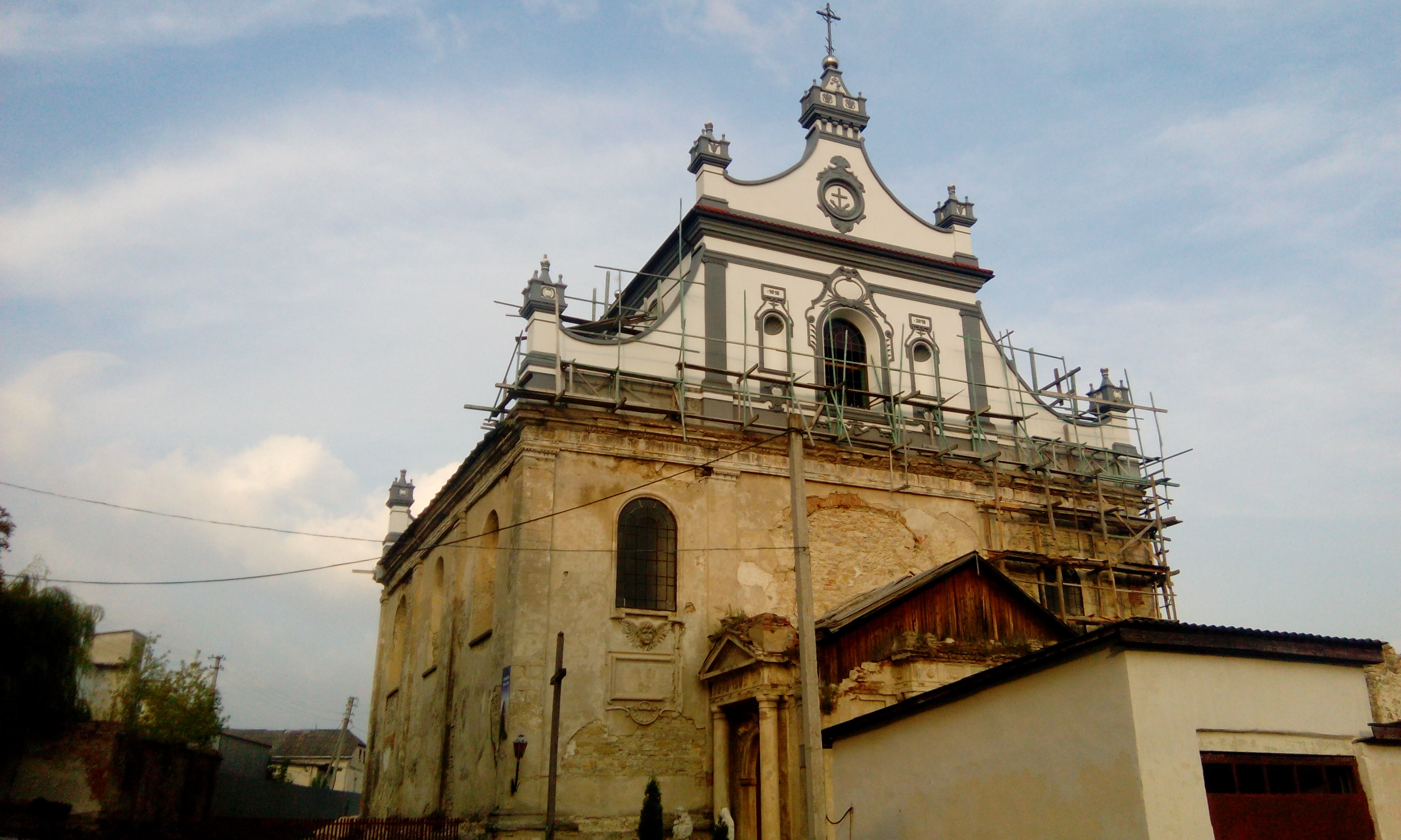 Костел, Гусятин, вул. Суходільська, 3